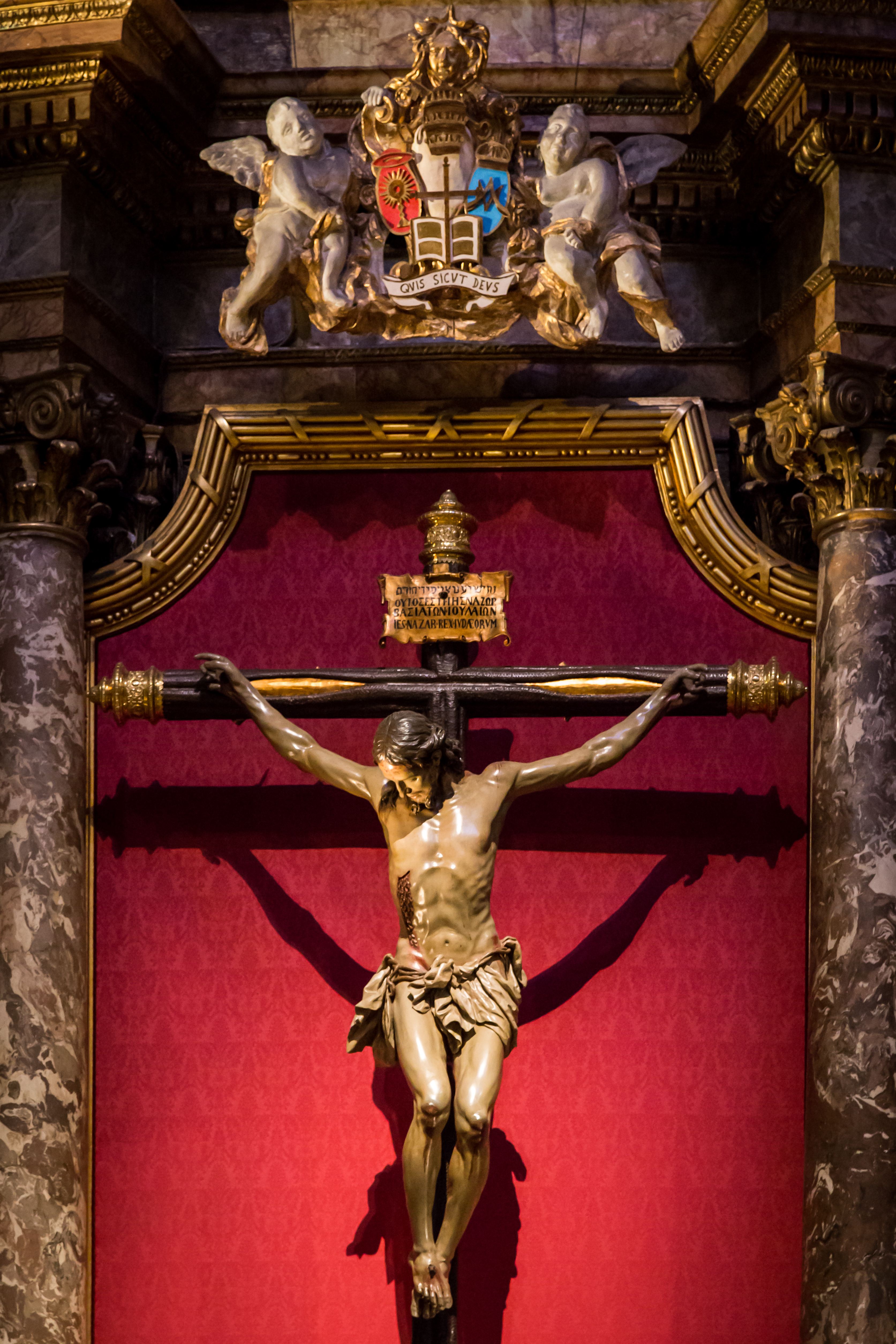 Imagen del Santísimo Cristo de la Fe y del Perdón. Capilla de las sagradas imágenes de la Hermandad Sacramental y Cofradía de Nazarenos de "Los estudiantes". Basílica Pontificia de San Miguel, Madrid.